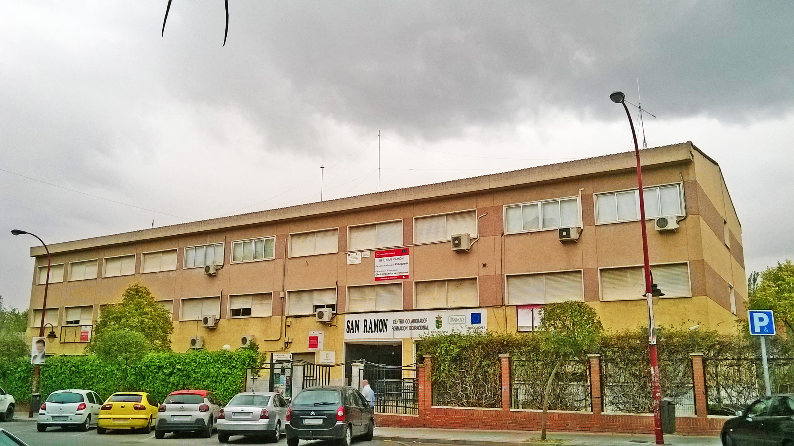 Antiguo Colegio San Ramon hoy día utilizado como Centro de formación